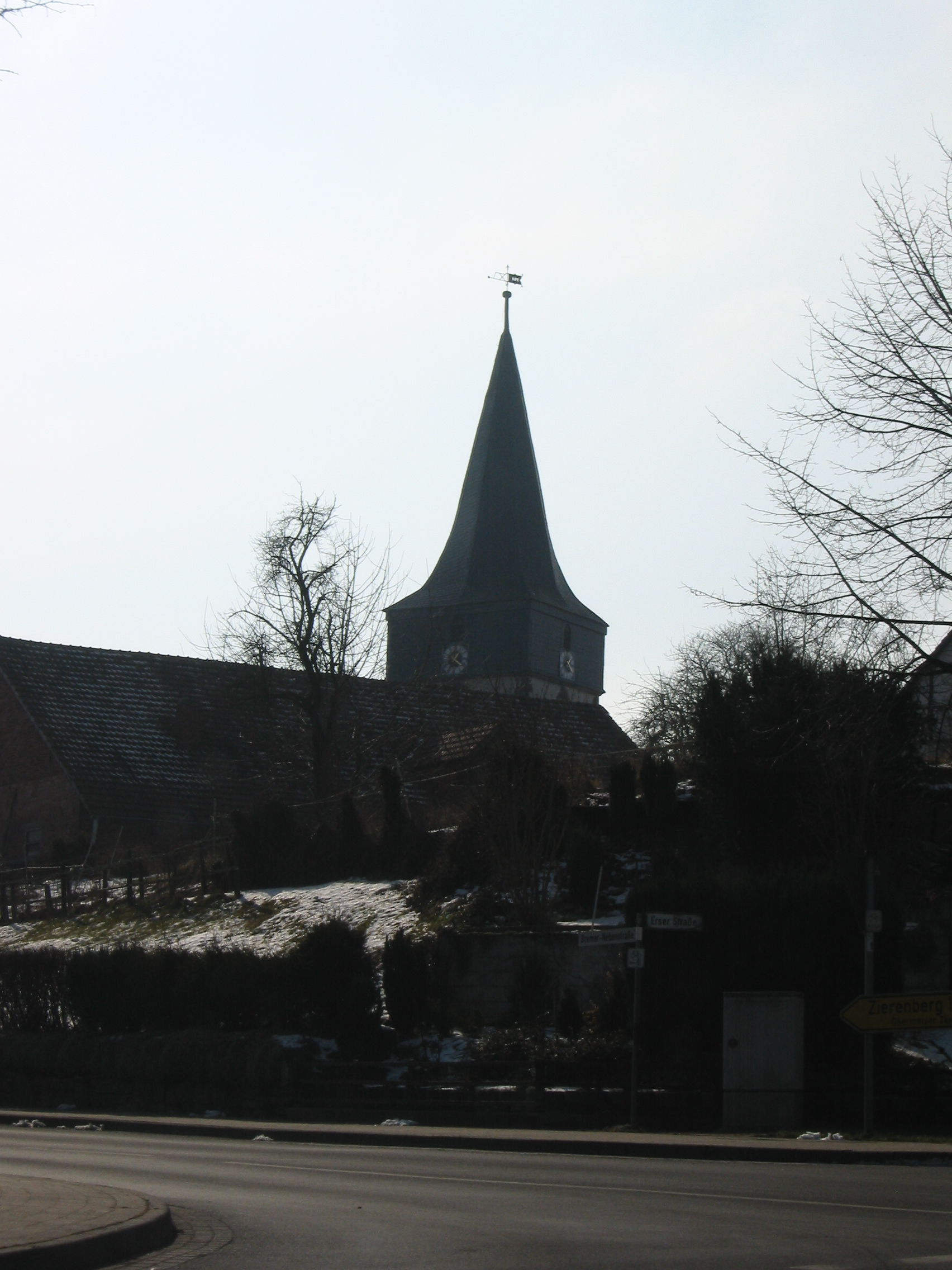 Church of Niedermeiser, Liebenau, Hessen.